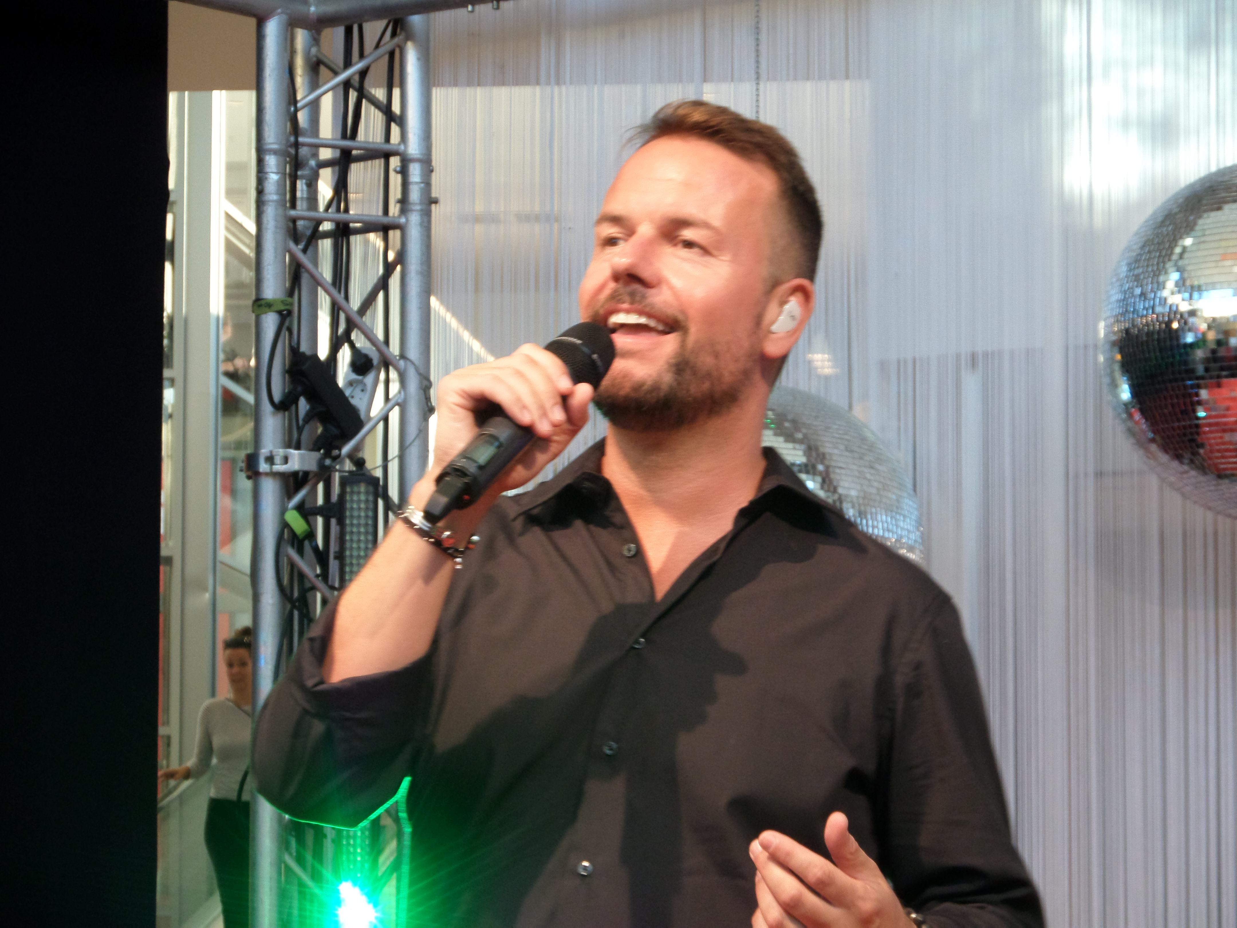 Lee Baxter bei einem Auftritt in Oldenburg